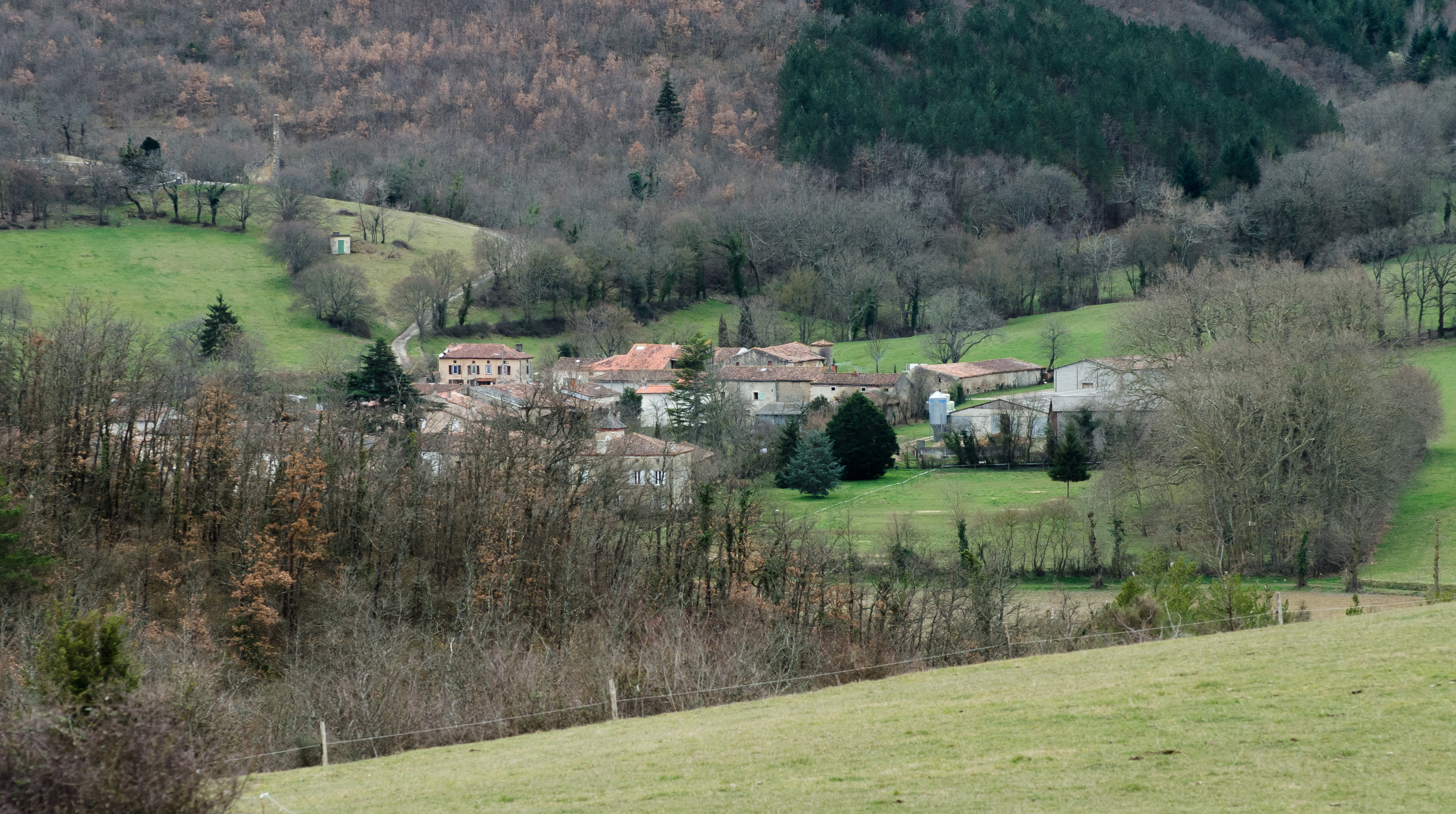 Le village de Malléon vu des coteaux.